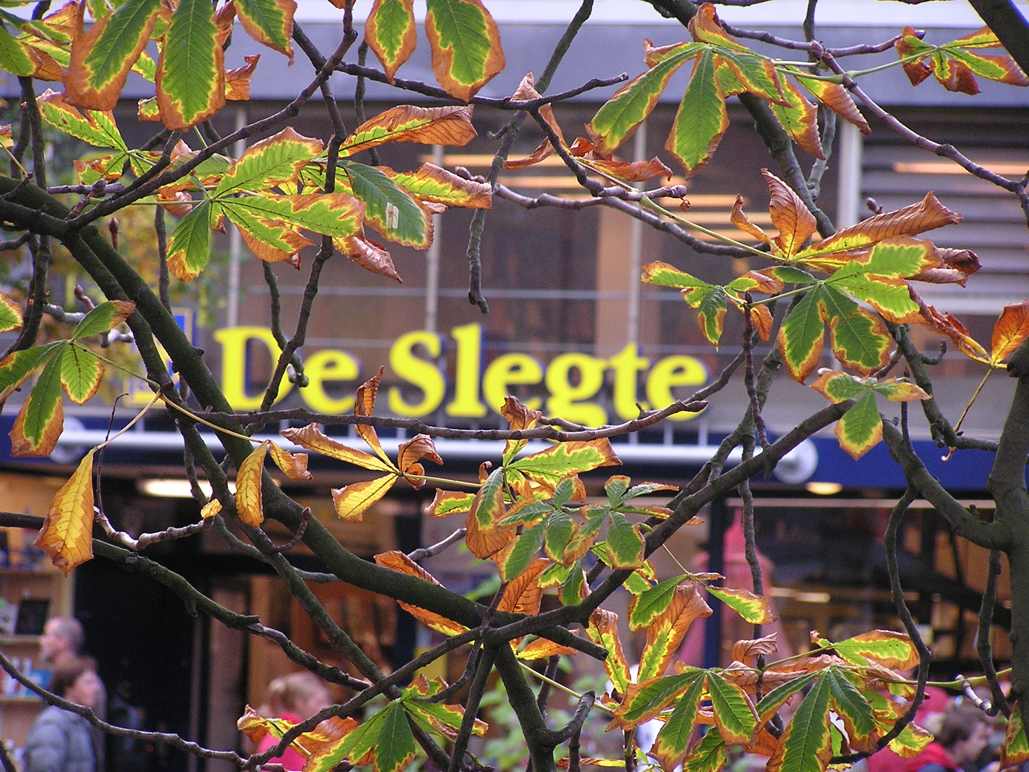 De Slegte shop in Utrecht